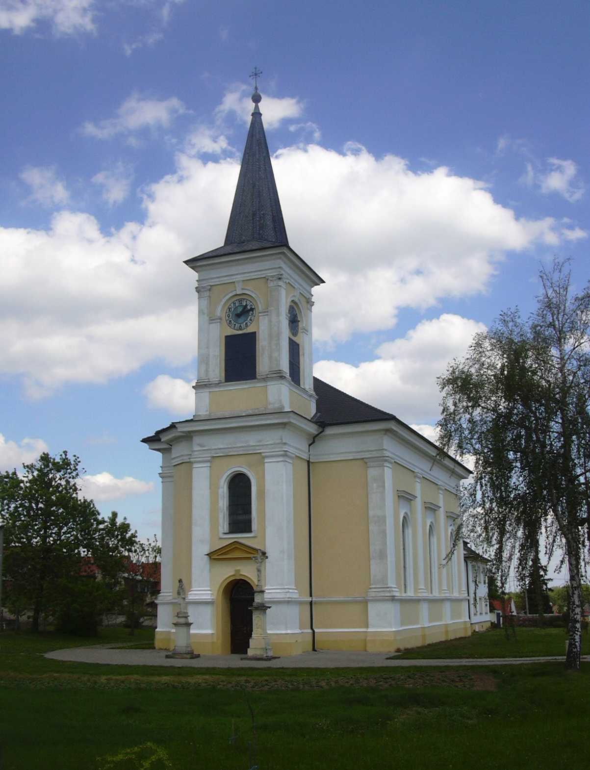 Farní kostel Narození Panny Marie, Drysice (Vyškov District - Czech republic)